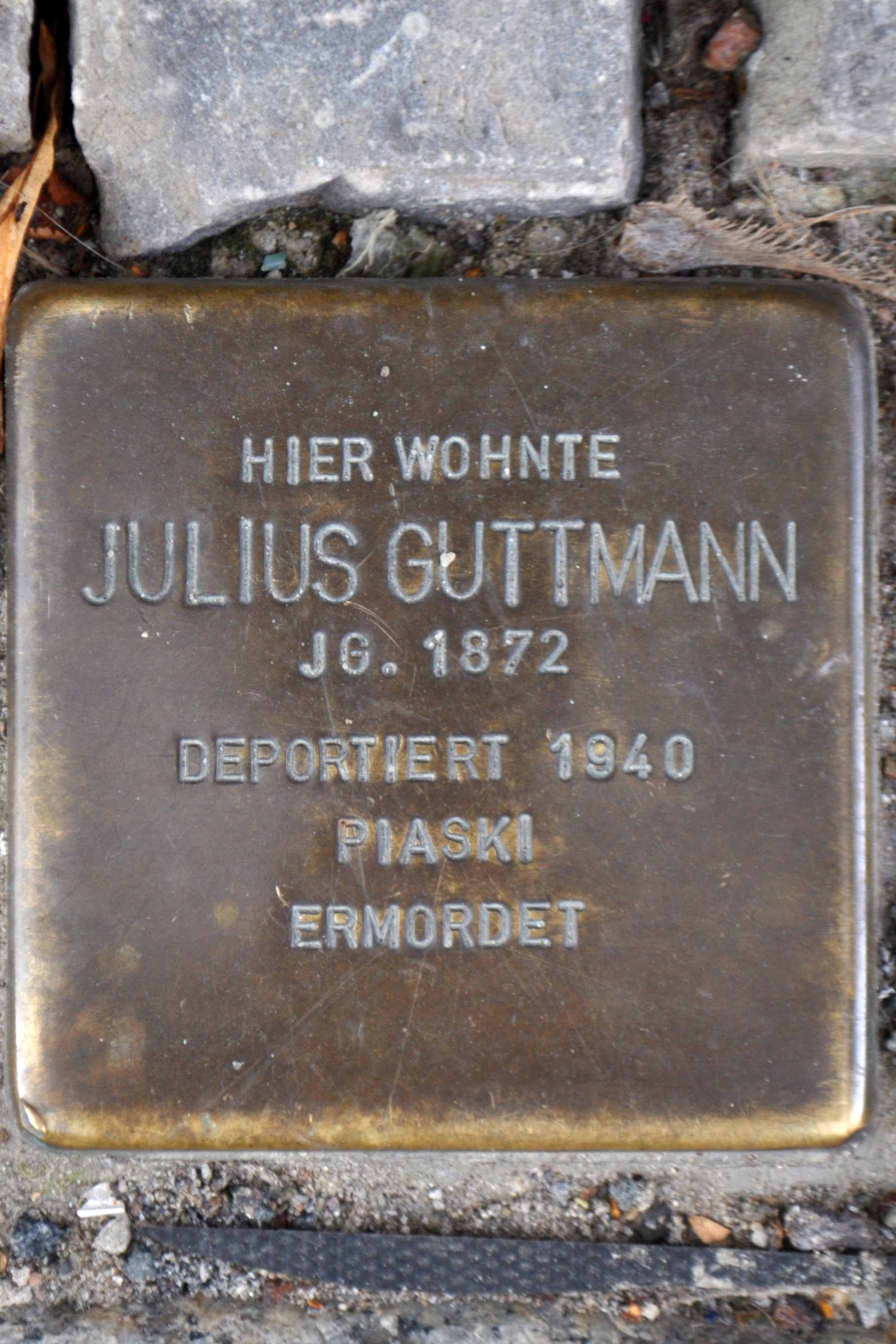 Stolperstein in Stralsund, Tribseer Straße. Der Stein ist einer von zwei Stolpersteinen an diesem Ort. Text: Hier wohnte Julius Guttmann Jg. 1872 deportiert 1940 Piaski ermordet